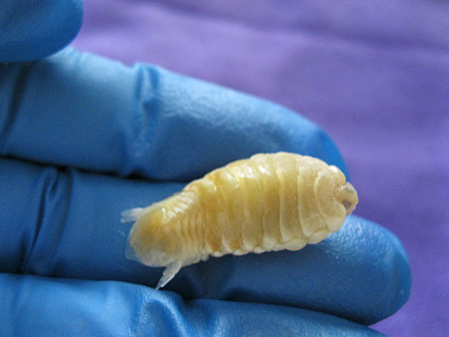 Parasita encontrado na boca de peixe